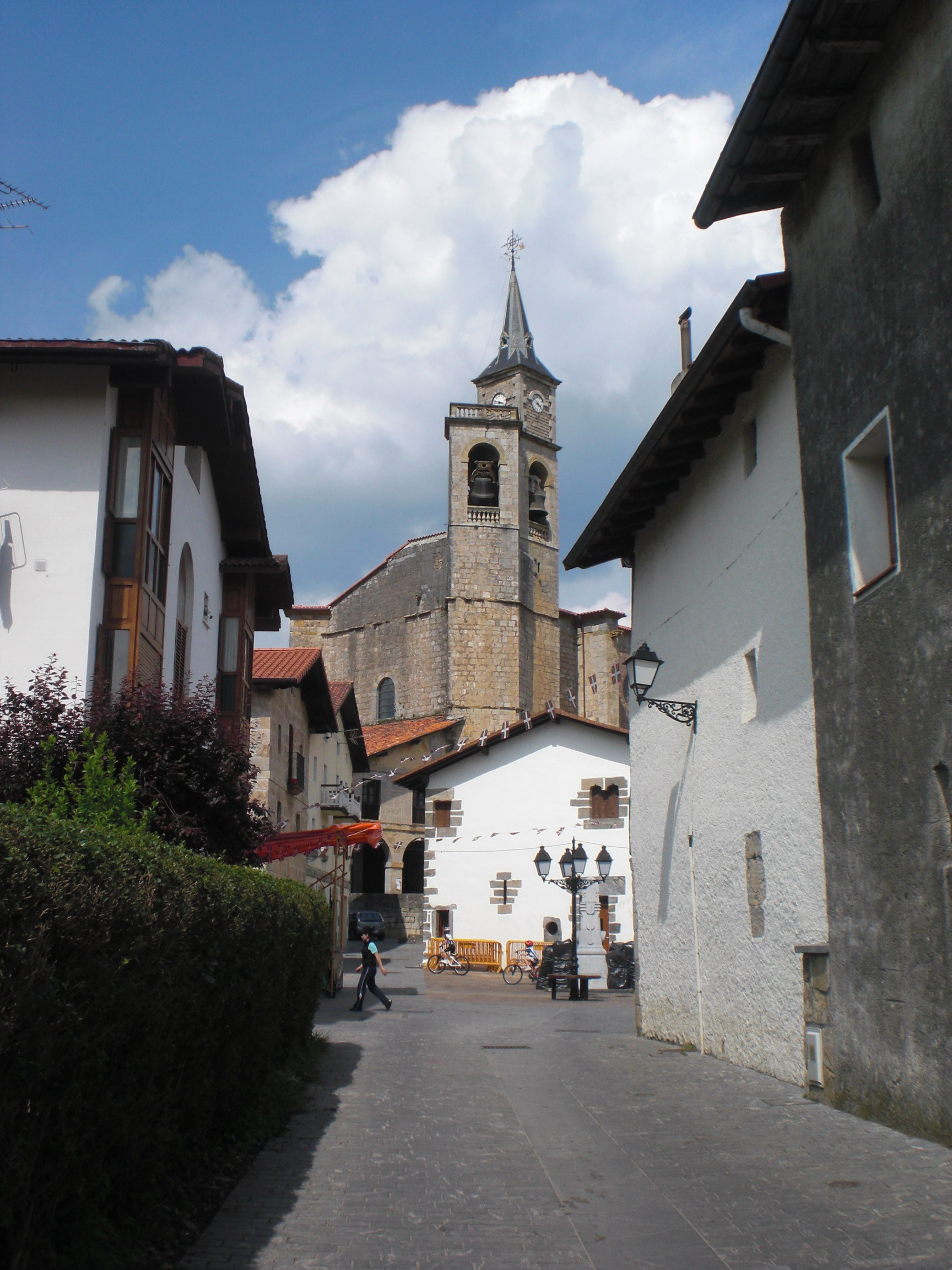 Asteasuko Elizmendi auzoko San Pedro eliza.